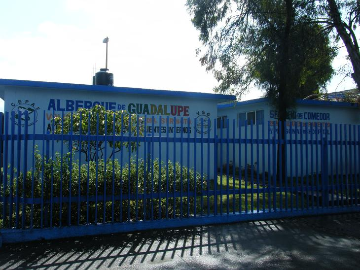 Albergue de Guadalupe en Uriangato (Interior del Hospital General de Uriangato)